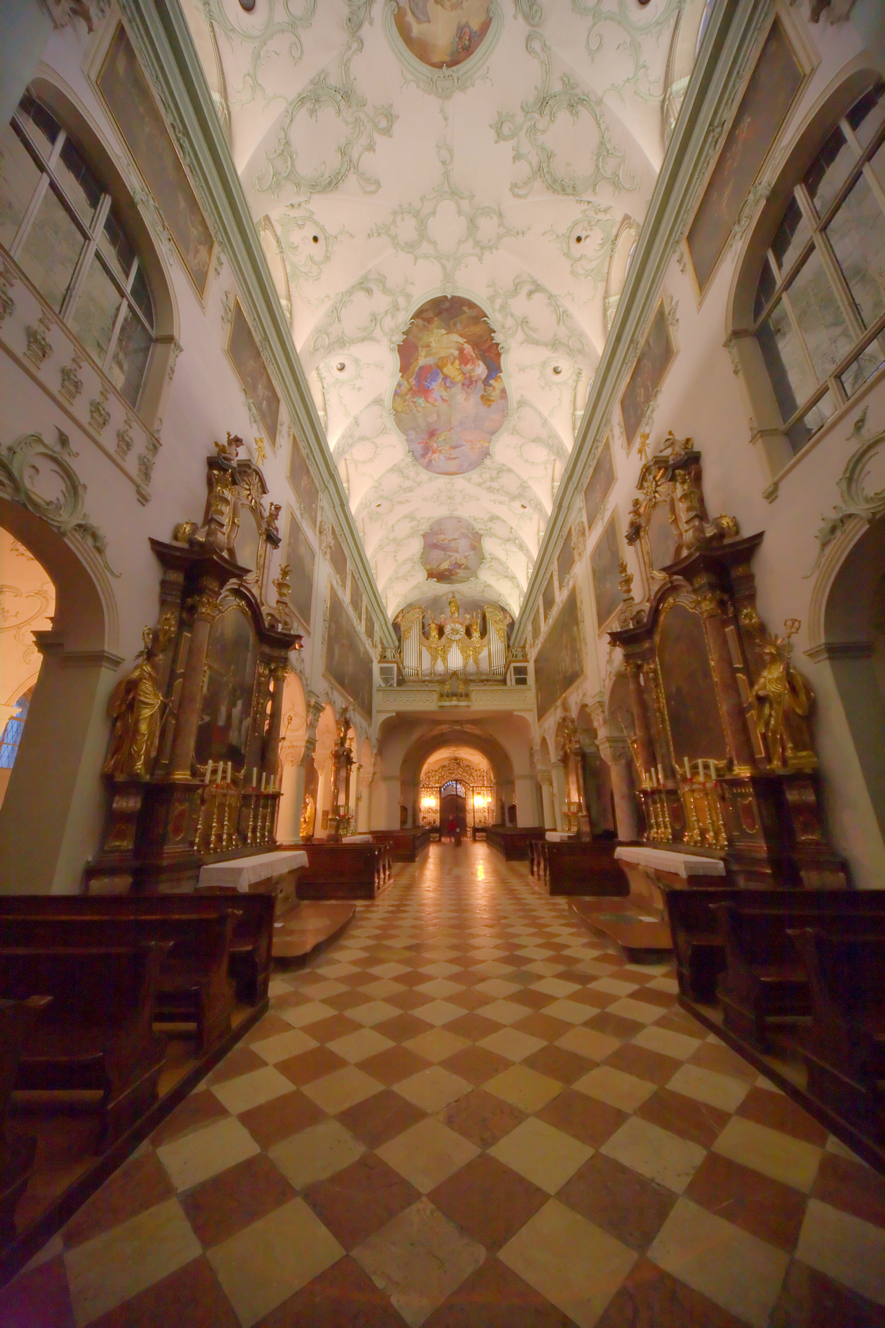 Stift St.Peter, Mittelschiff